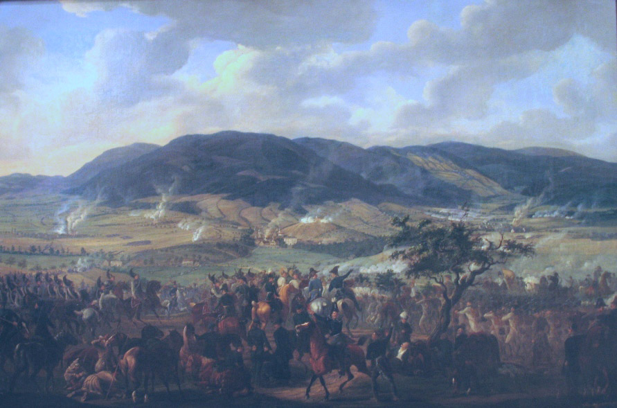 Die Schlacht bei Kulmtitle QS:P1476,de:"Die Schlacht bei Kulm" label QS:Lde,"Die Schlacht bei Kulm"